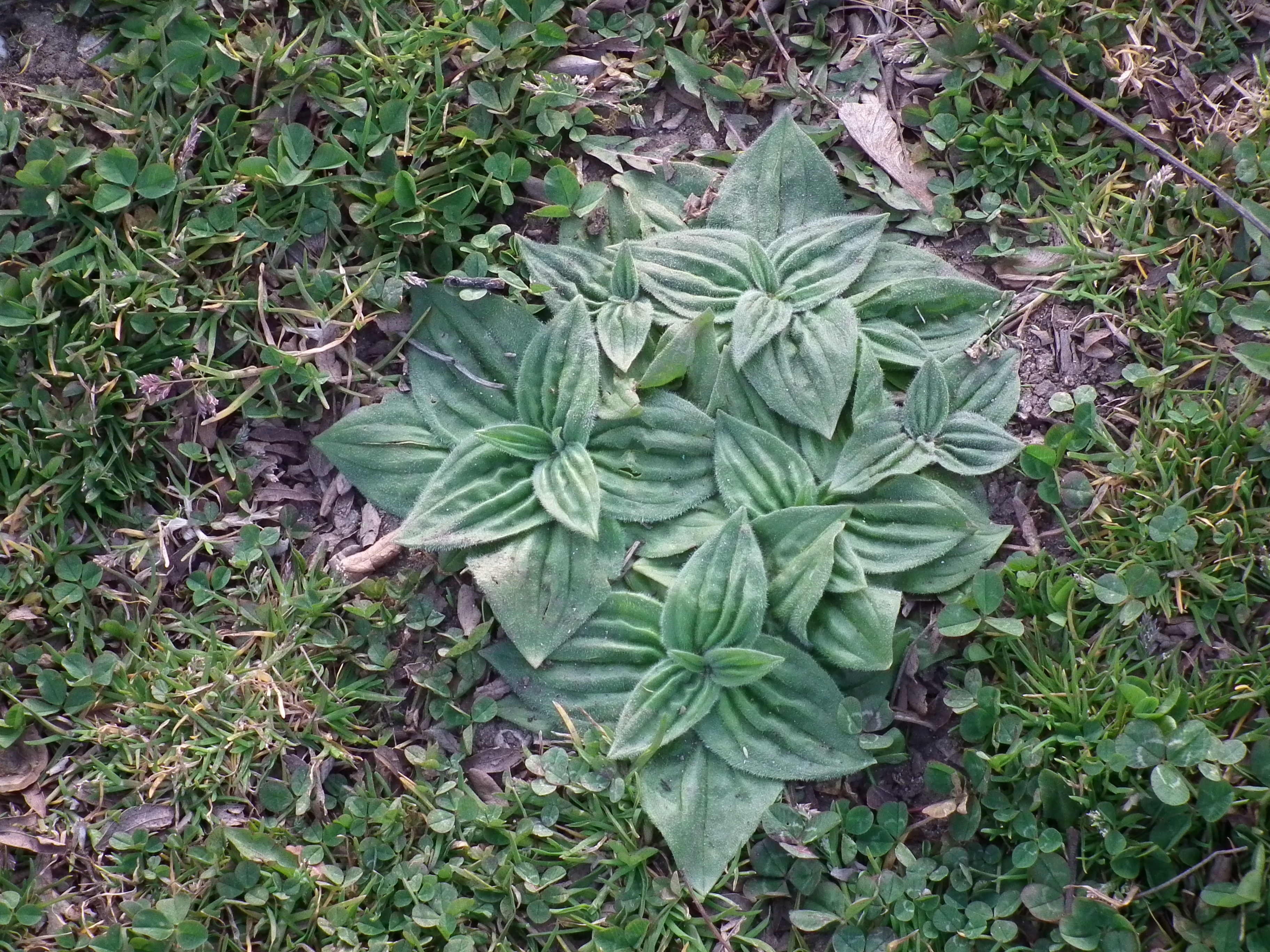 Mittlerer Wegerich (Plantago media), fotografiert in Heidelberg (Baden-Württemberg, Deutschland)